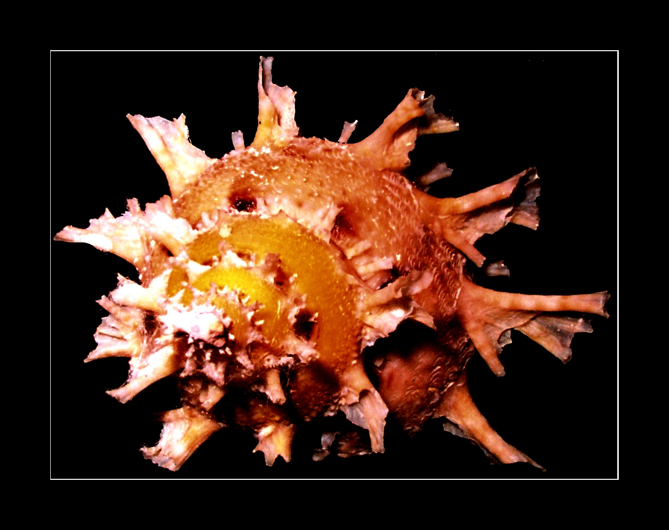 Bolma girgyllus (Reeve, 1861) ; family Turbinidae